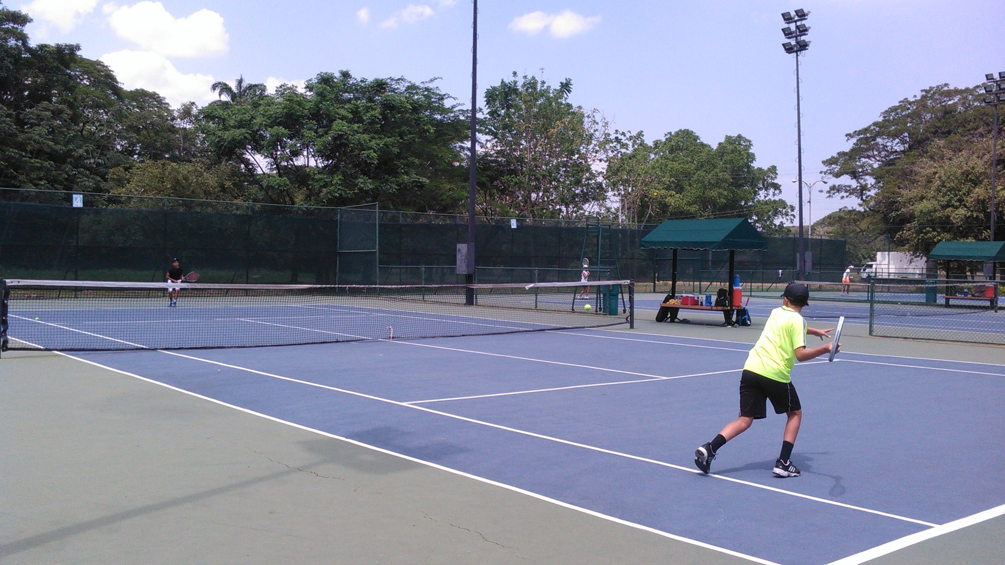 Complejo de Tennis Juan Carlos Bianchi, Maracay